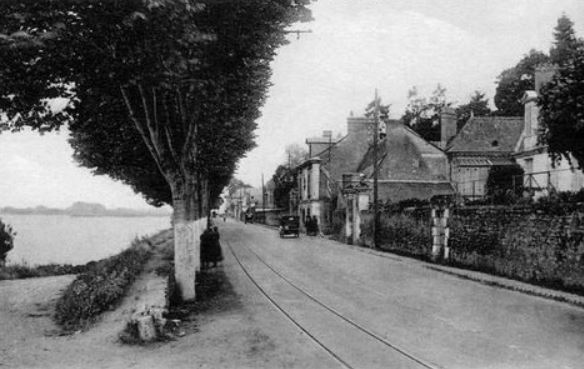 Ancienne photographie ou carte postale représentant le quai et lieu-dit de la Guignière vers la fin du XIXe - début du XXe siècle à Fondettes.